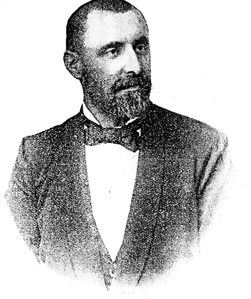 Знаменити Срби: Јован Грчић (1855 - 1941), срп. књижевник и проф. срп. вел. гимназије новосадске